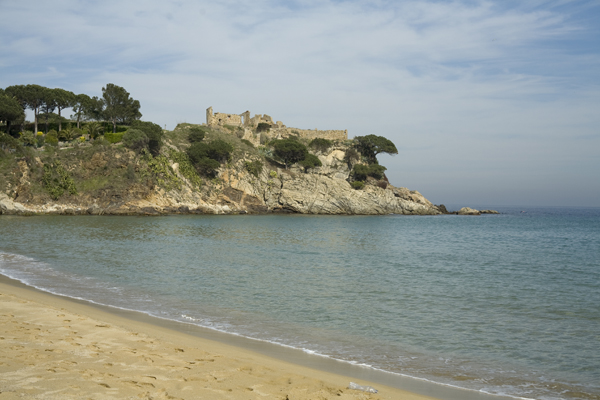 unidentified Spain